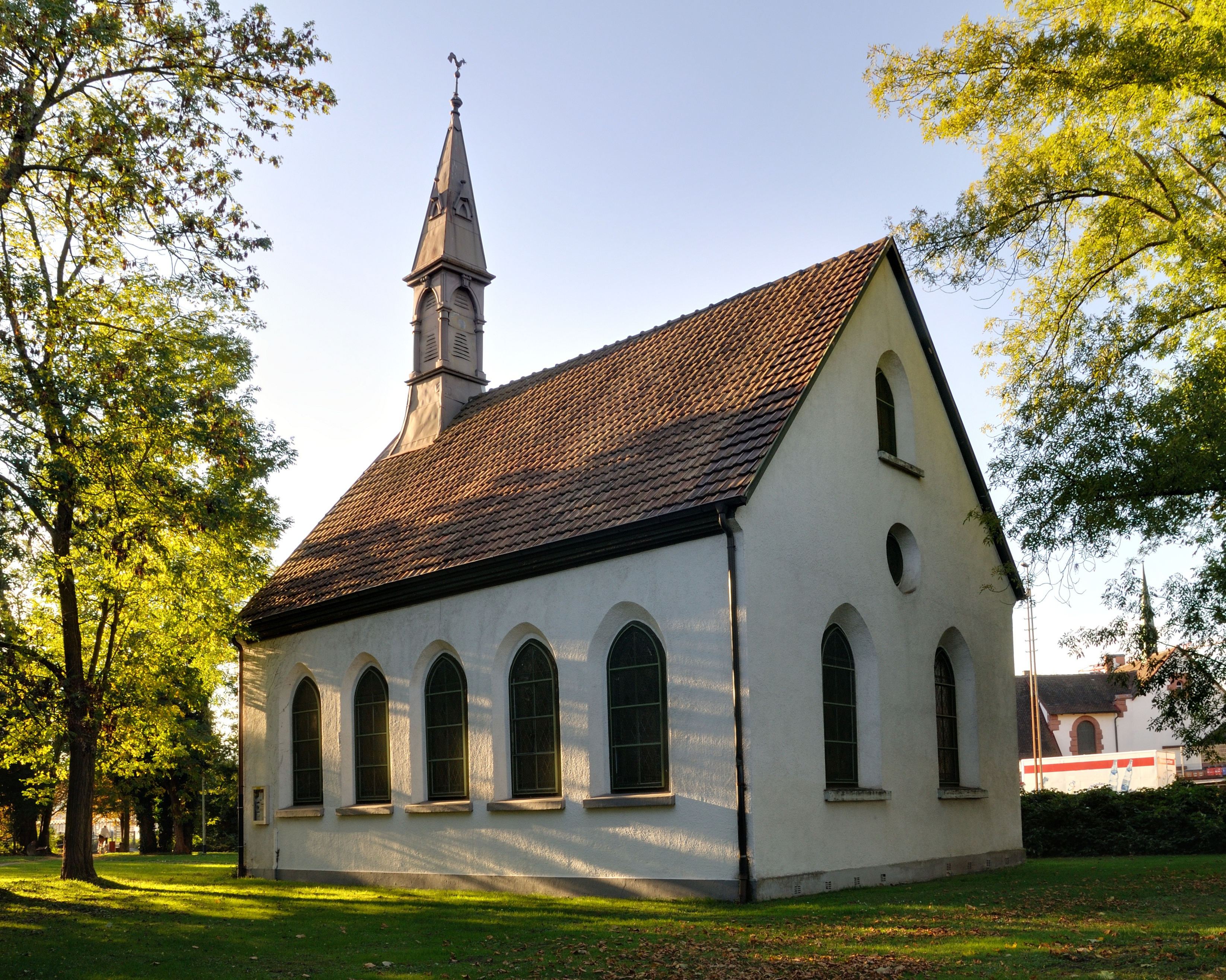 Rheinfelden: Adelberger Kirche